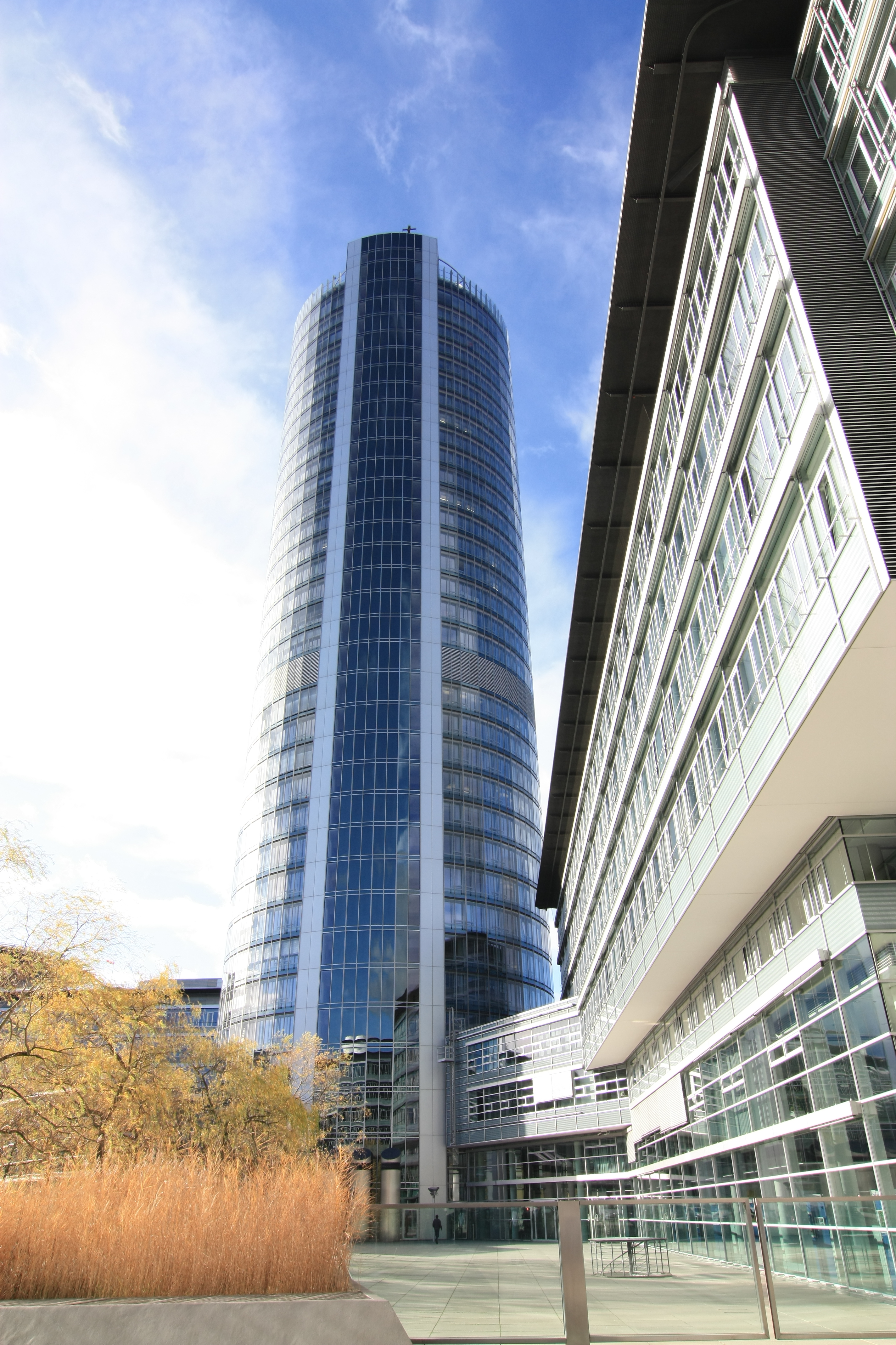 Business Tower in Nürnberg